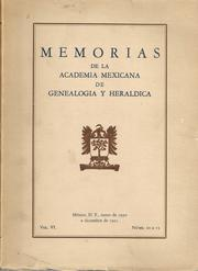 Memorias de la Academia Mexicana de Genealogía y Heráldica, Tomo VI (1a. Época), 1951